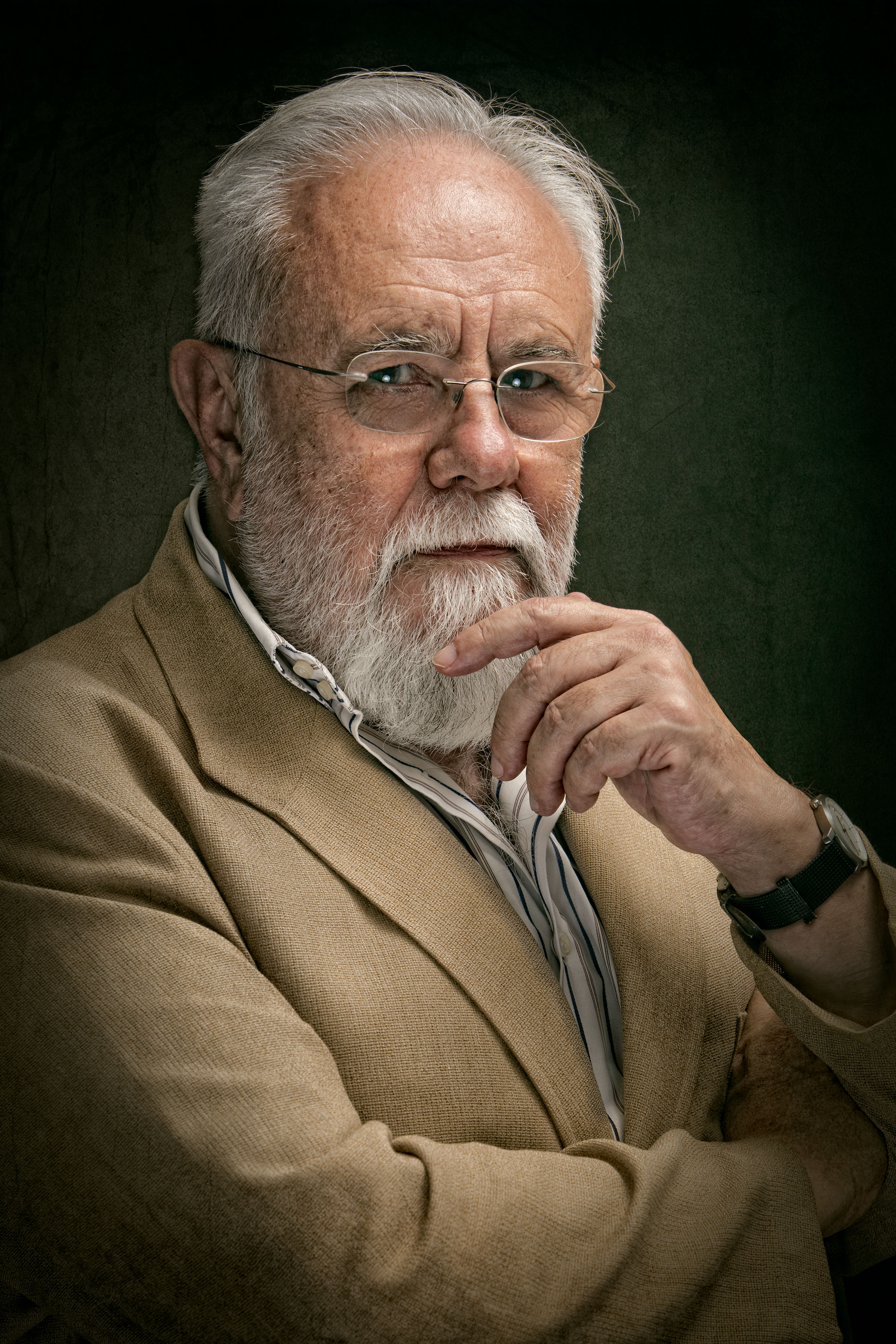 Foto de Gonzo Suárez